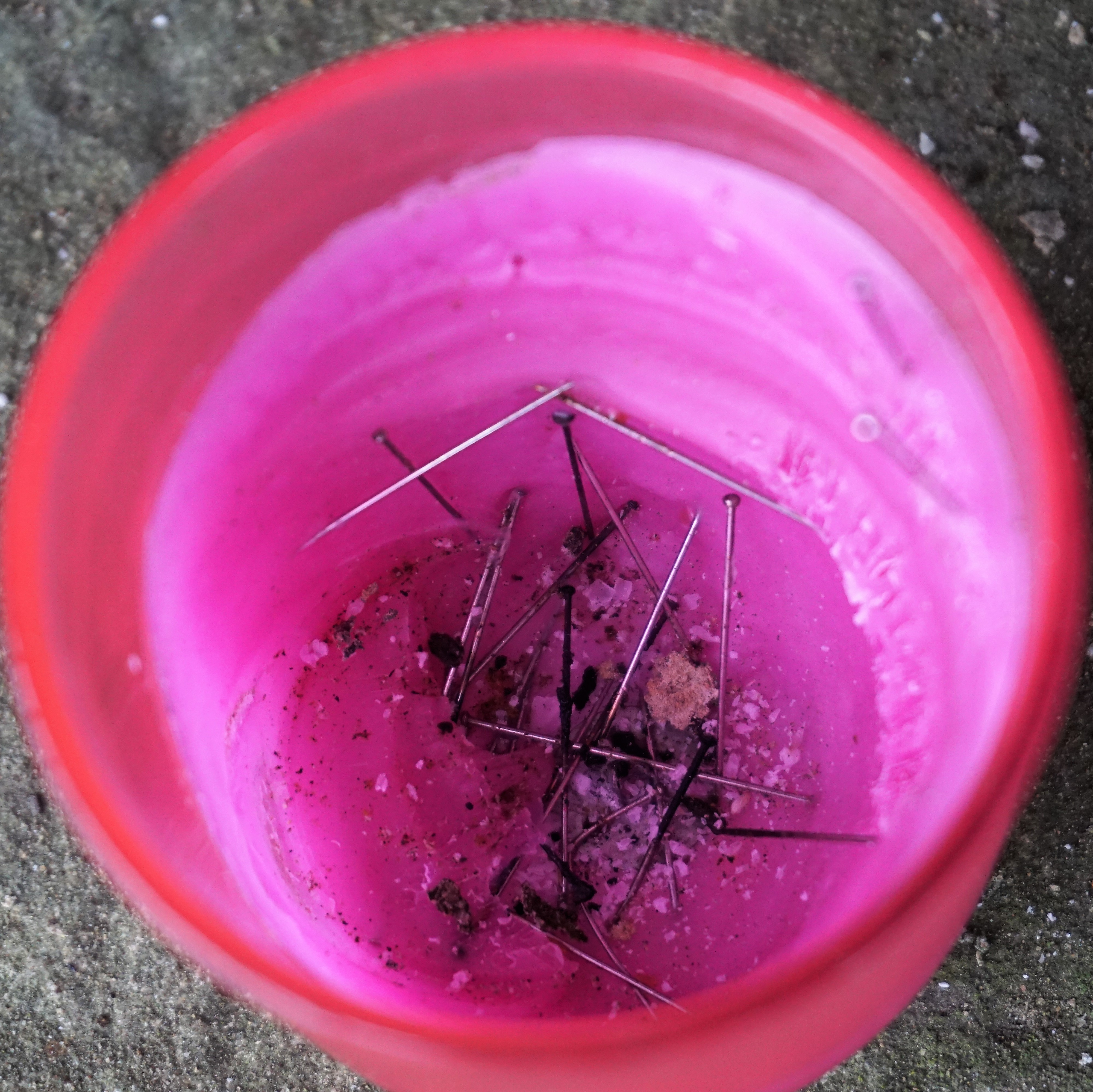 Lëtzebuerg-Lampertsbierg. Spéngelen dei beim Ofbrenne vun der Käerz Rescht bliwwe sinn.